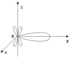 Chrakterystyka szpilkowa